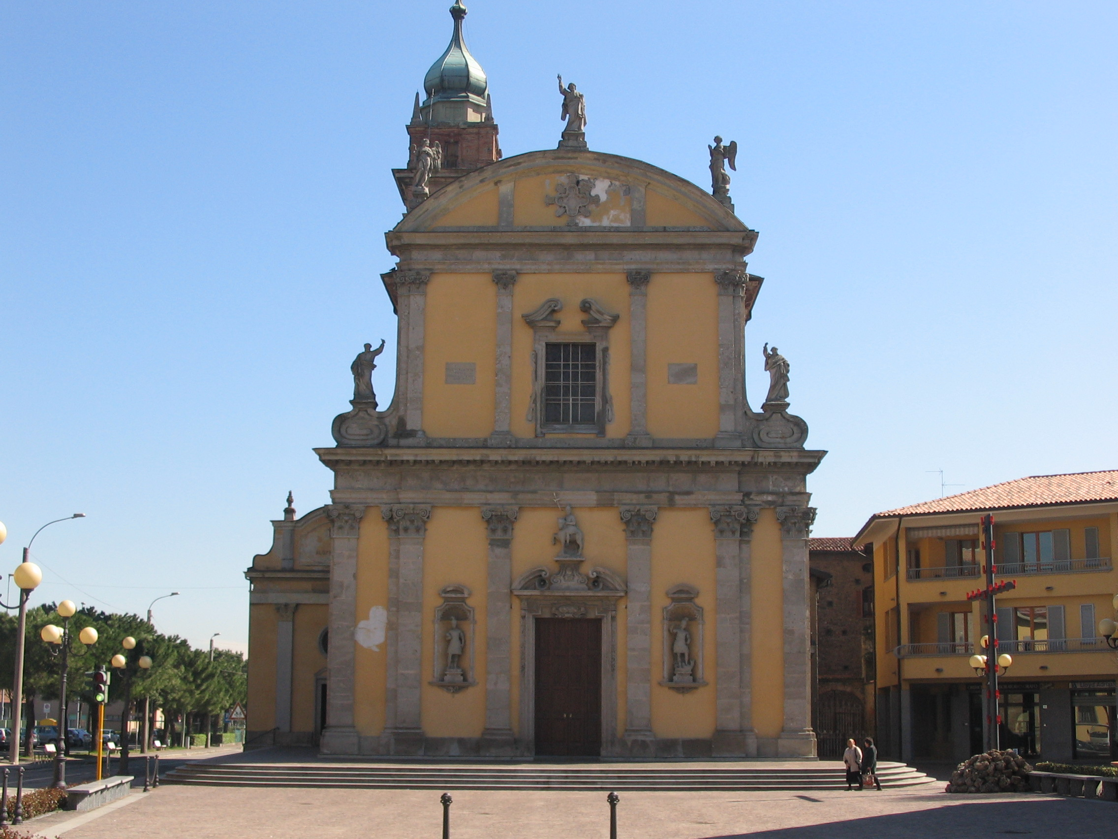 Autore Giorces. La Parrocchiale.